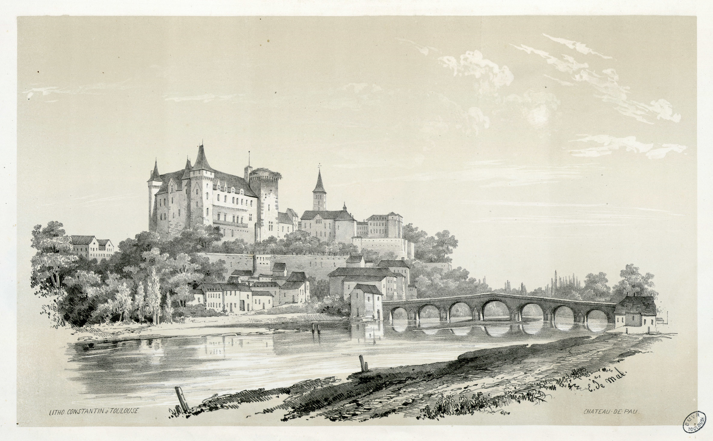 Fait partie d'un recueil de 15 planches lithographiées en camaïeu avec titre lithographié Ancely, René (1876 - 1966). Possesseur